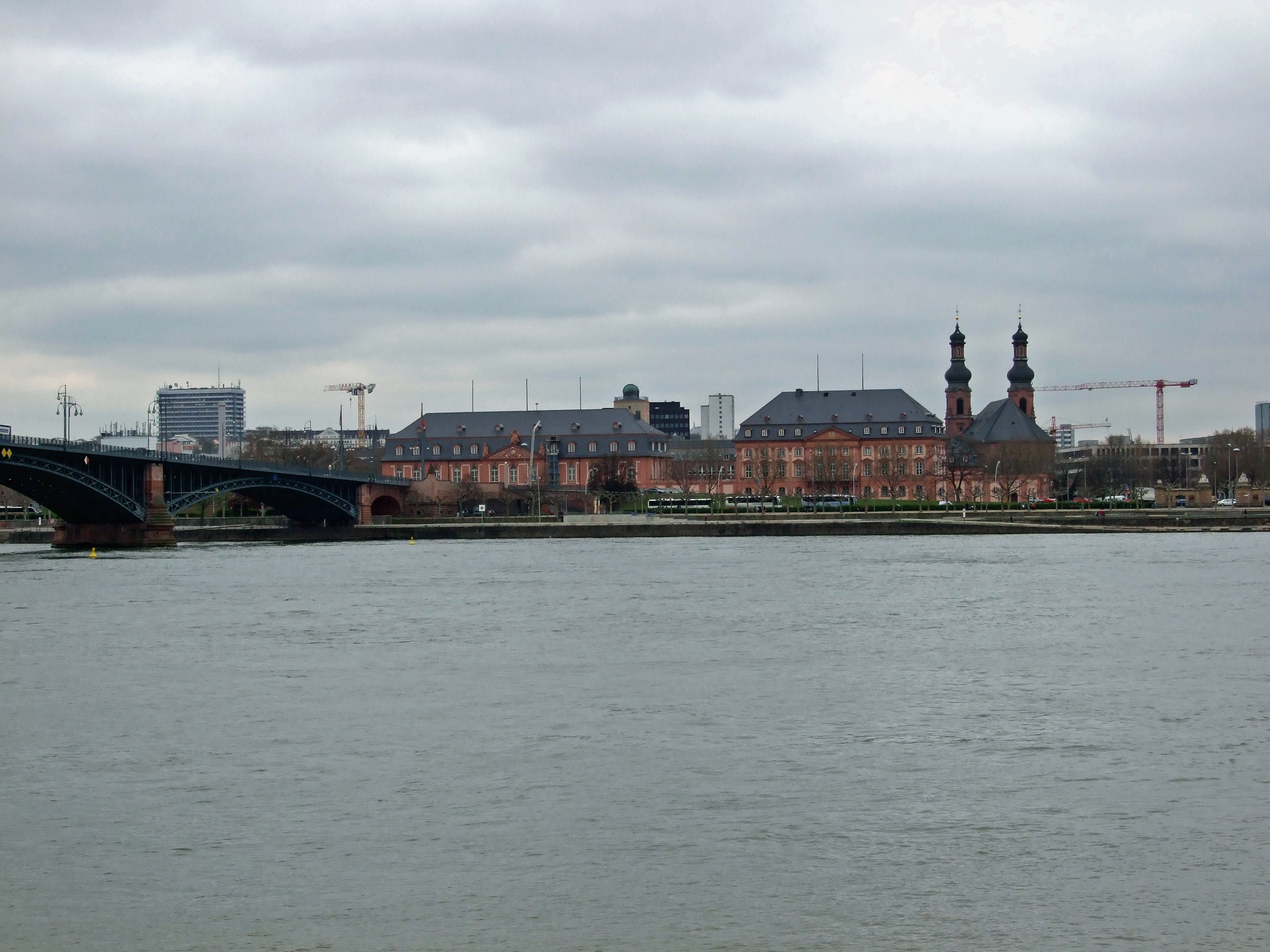 Das Mainzer Ufer, mit der Rheinland-Pfälzischen Staatskanzlei und dem Landtag vom Wiesbadener Ufer aus